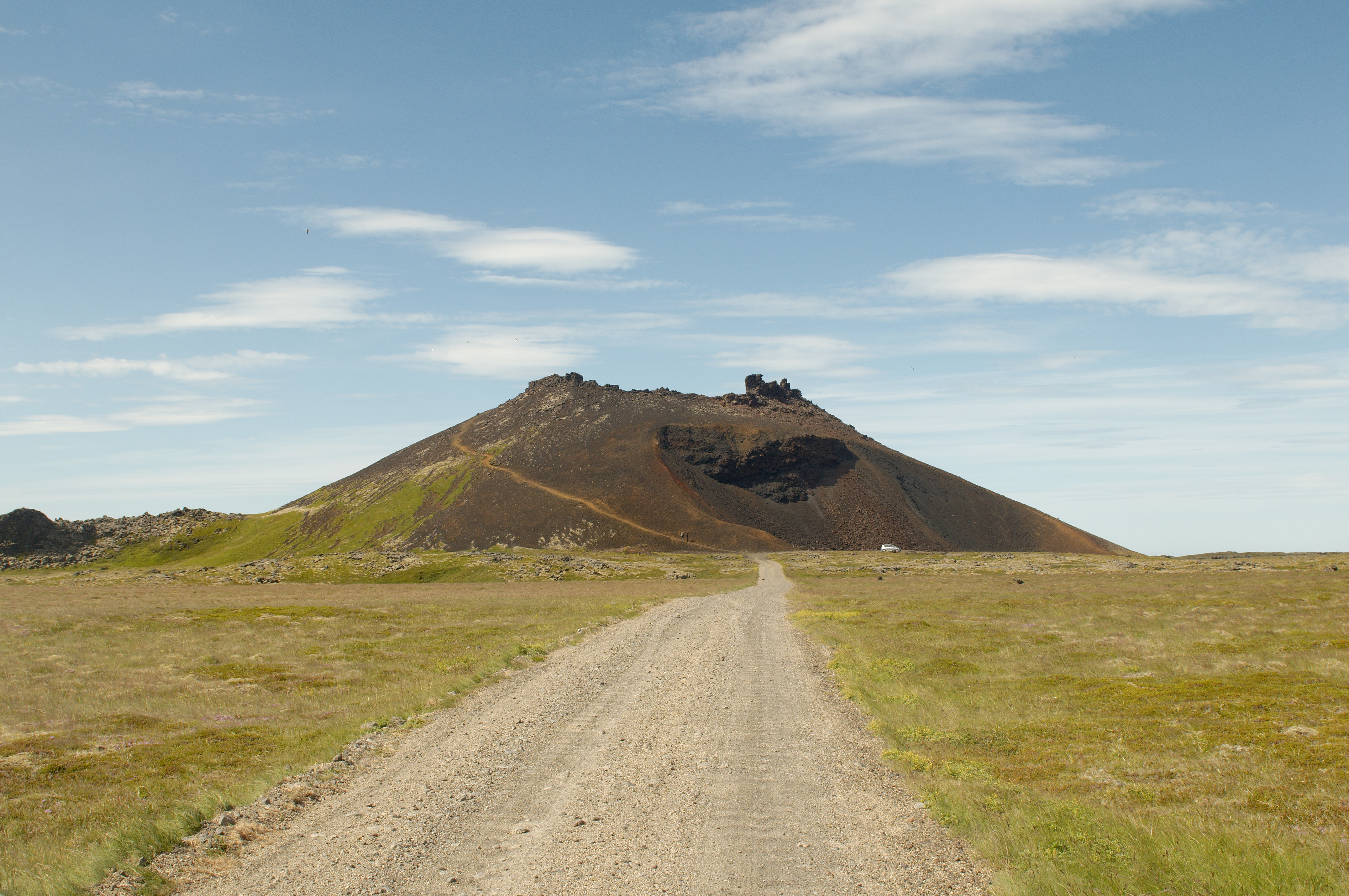 Saxhöll